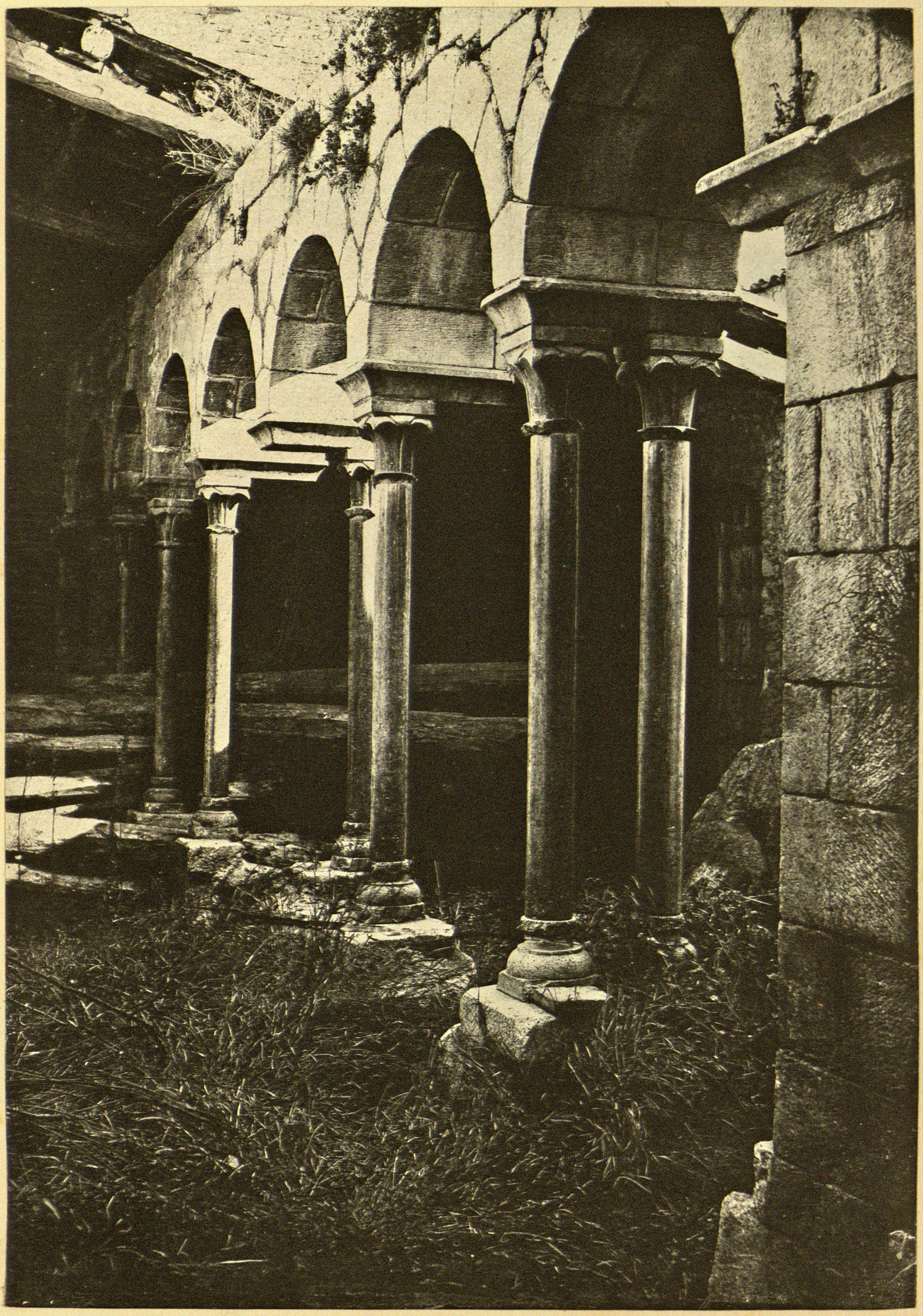 'Claustre de Sant Salvador de Breda', fotografia d'Heribert Mariezcurrena (~1878). Estampa núm. 4, acompanyada de text explicatiu, a l'Album Pintoresch-Monumental de Catalunya: aplech de vistas dels més notables monuments i paisatjes d'aquesta terra acompanyadas de descripcions y noticias históricas y de guias pera que sían fácilment visitats, publicat per l'Associació Catalanista d'Excursions Científiques el 1878. De disposició lliure al dipòsit digital de documents de la UAB.